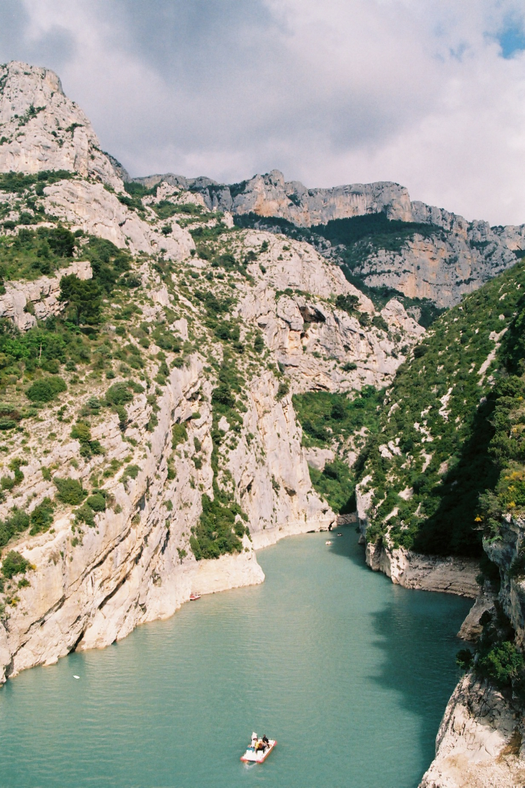 Le lac de Sainte-Croix dans le département du Var.